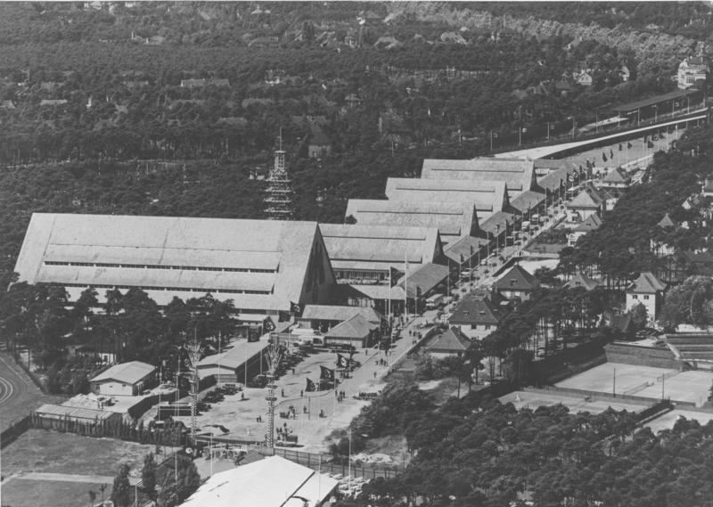 Gesamtansicht der KdF-Olympiastadt zwischen dem Bahnhof Heerstraße und der Deutschlandhalle in Berlin. Bauleitung: Bauabteilung der Deutschen Arbeitsfront (Eigentum des Architekturbüros d. DAF)